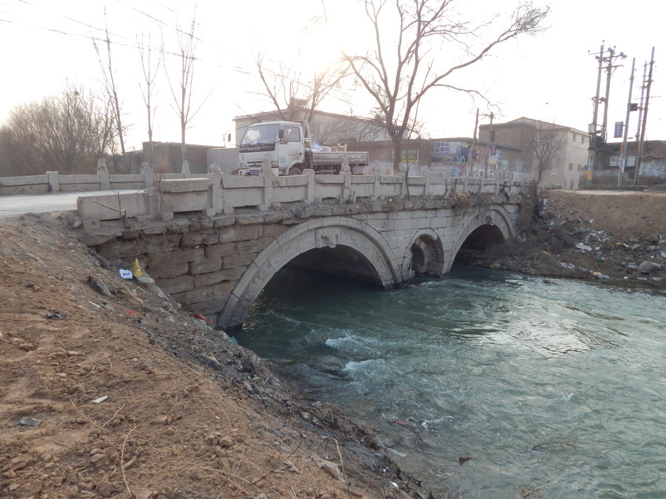 中文（中国大陆）: 石拱桥，又叫大石桥，位于河北省邯郸市磁县花官营乡石桥村东，根据石桥结构、造型推测石桥年代为明代。2005年，被公布为邯郸市第二批市级文物保护单位。